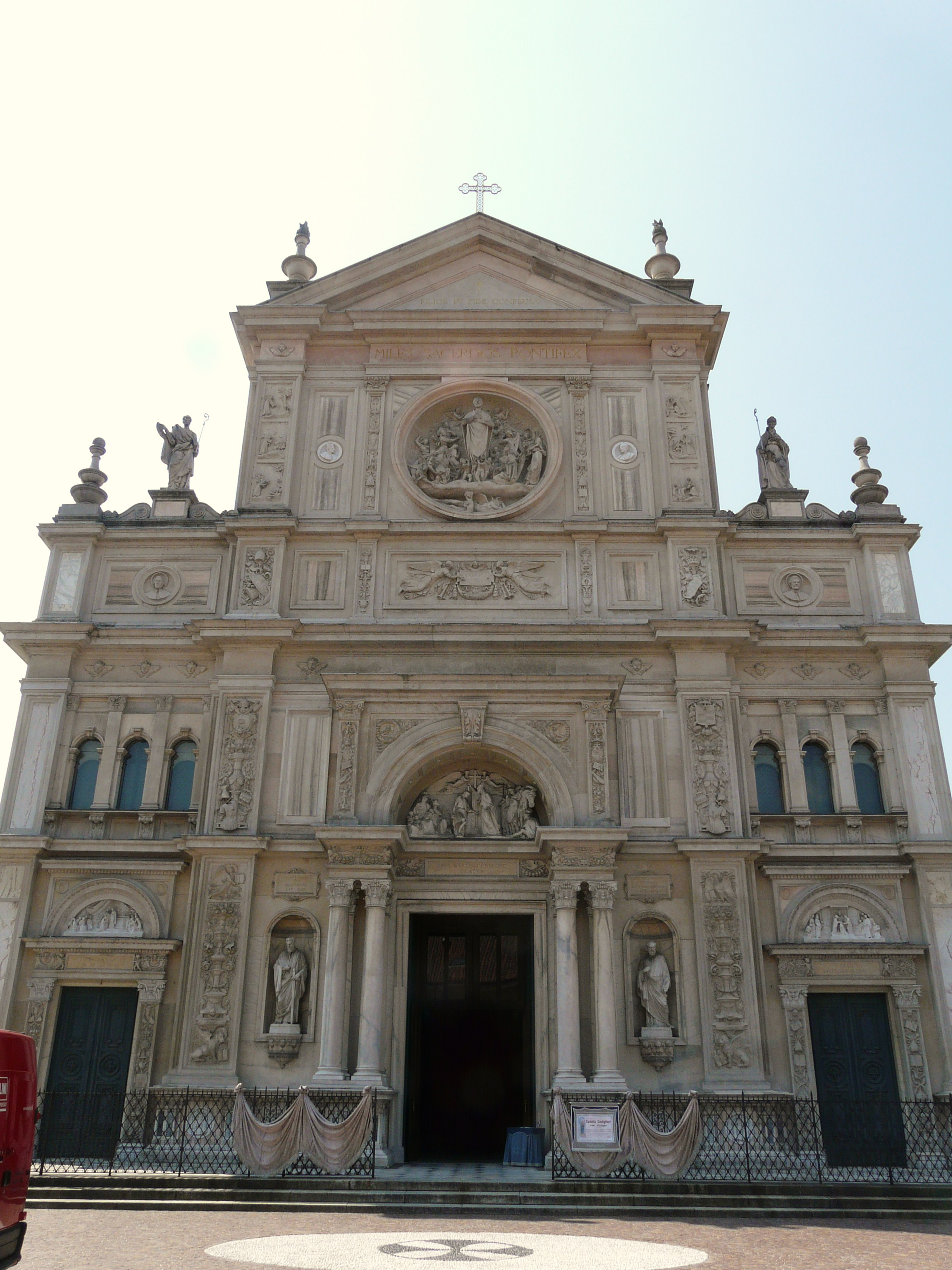 Chiesa di San Martino, Magenta, Lombardia, Italia